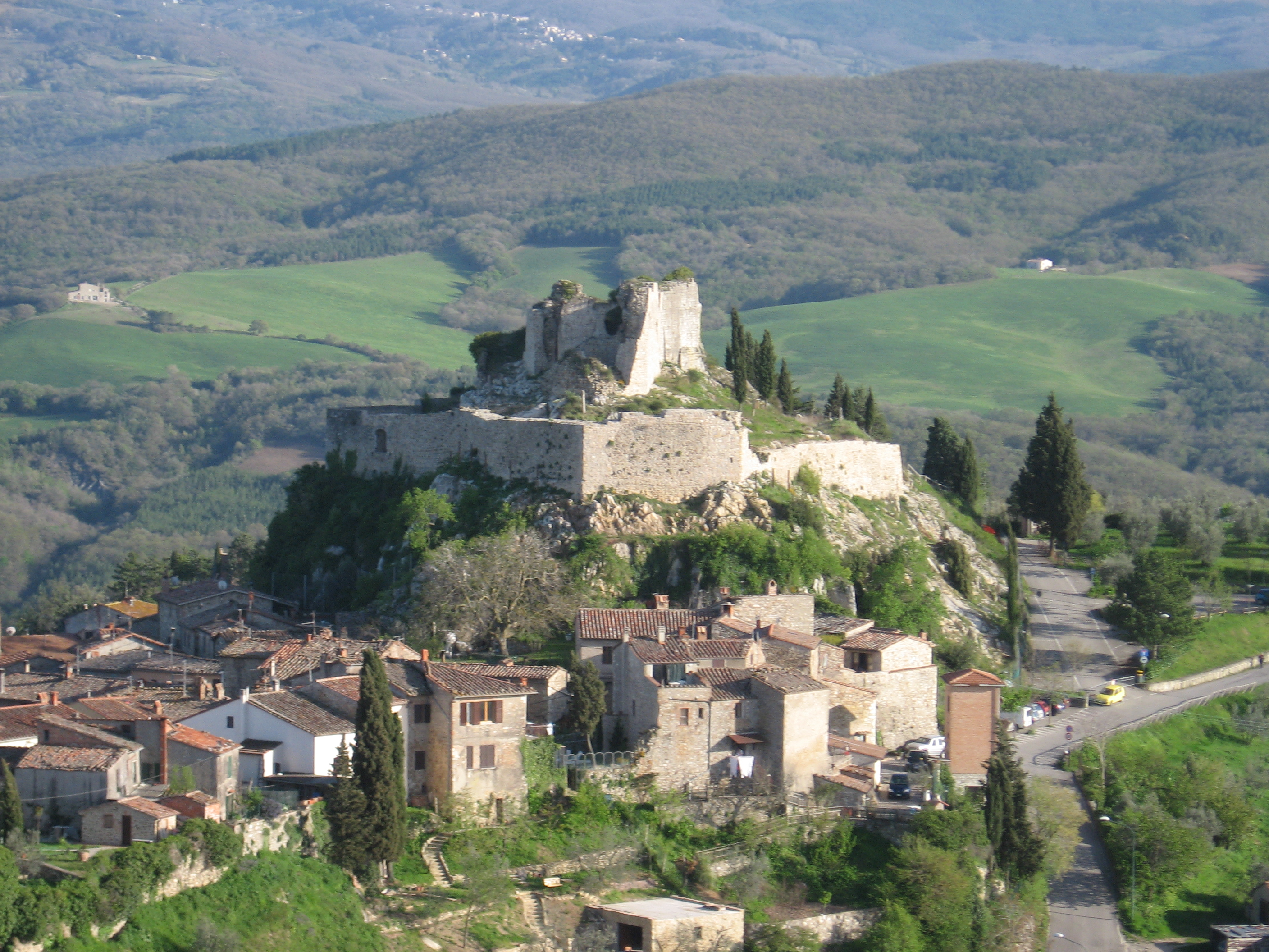 La rocca Aldobrandesca di Castiglione d'Orcia Contents 1 batch 2 source 3 date 4 author 5 Licensing 6 Original upload log batch Wikimangia 2008 source date 19-20 aprile 2008 author Senpai